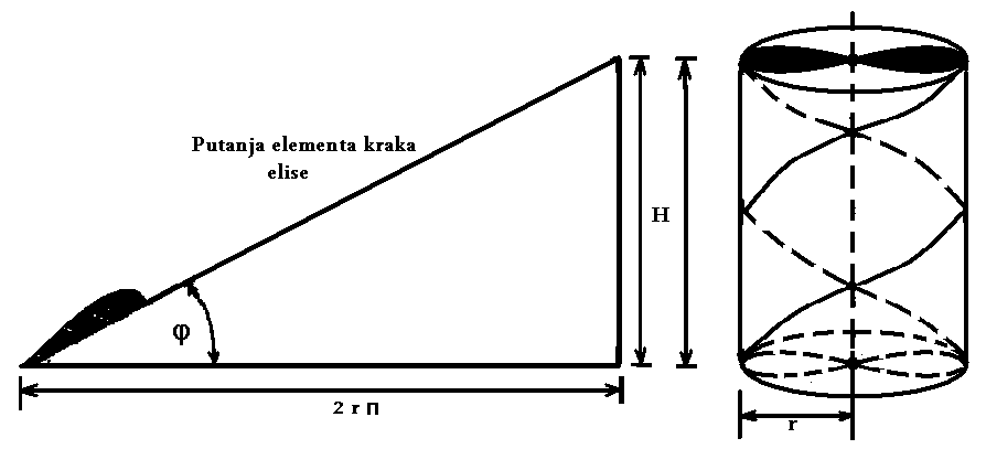 Propeller pitch schematic diagram